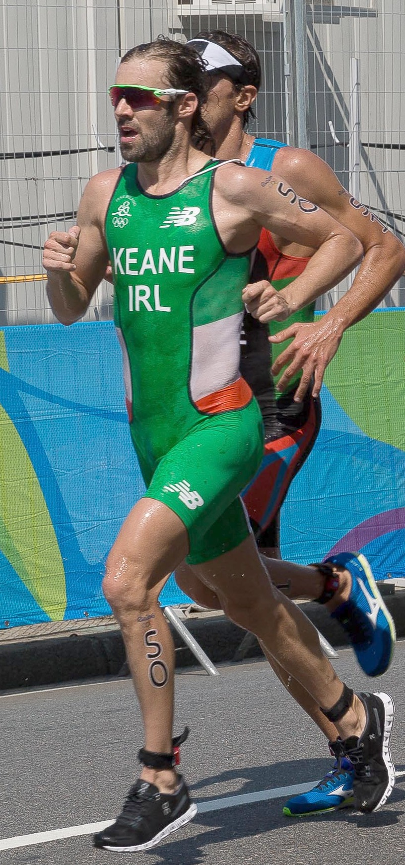 Atletas do Triatlo Masculino durante corrida, Copacabana , Rio de Janeiro